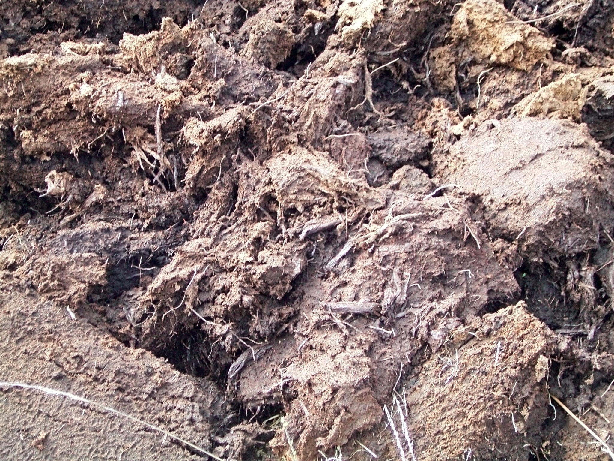 Torf mit erkennbaren Pflanzenresten